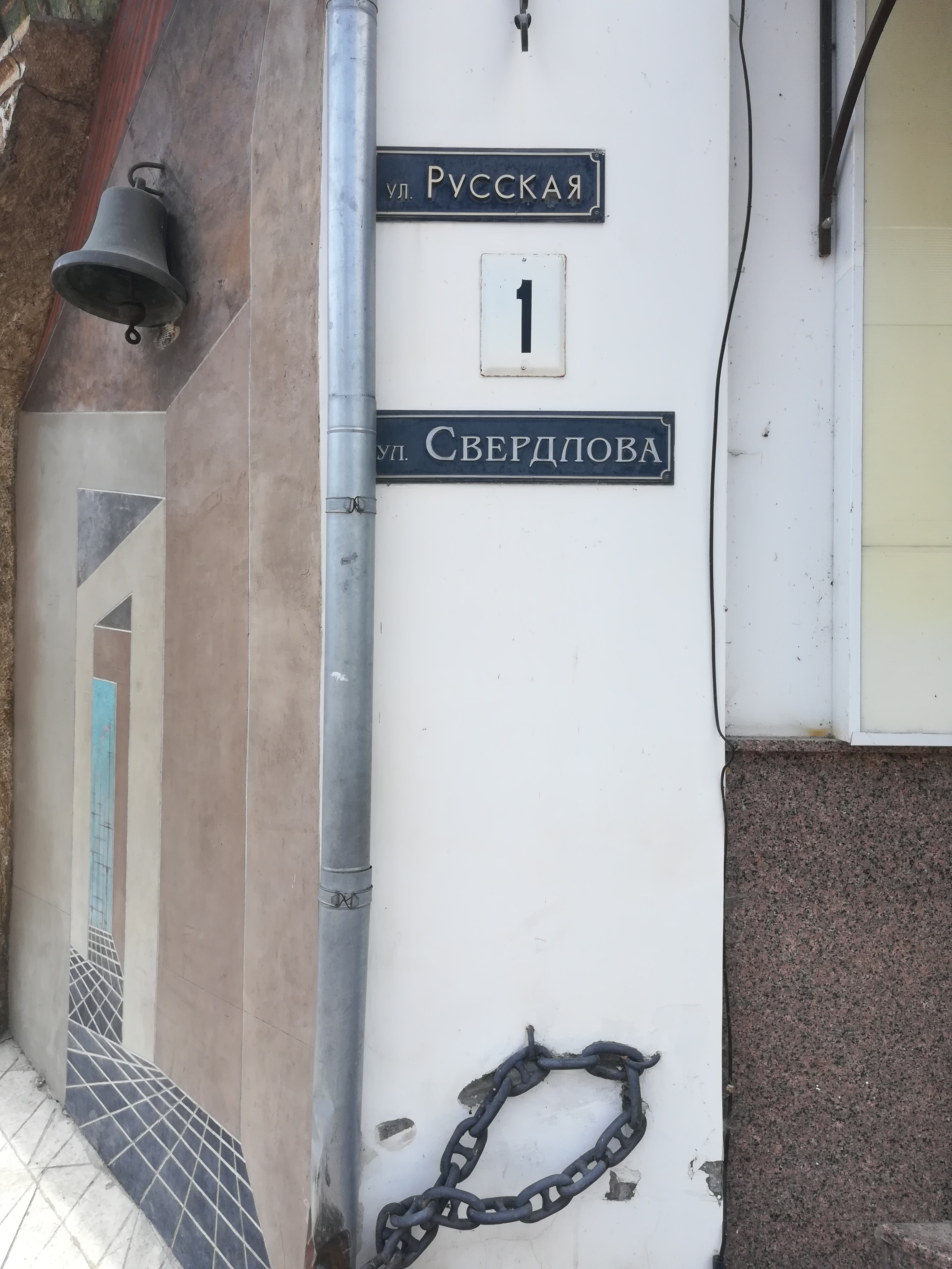 Русская улица